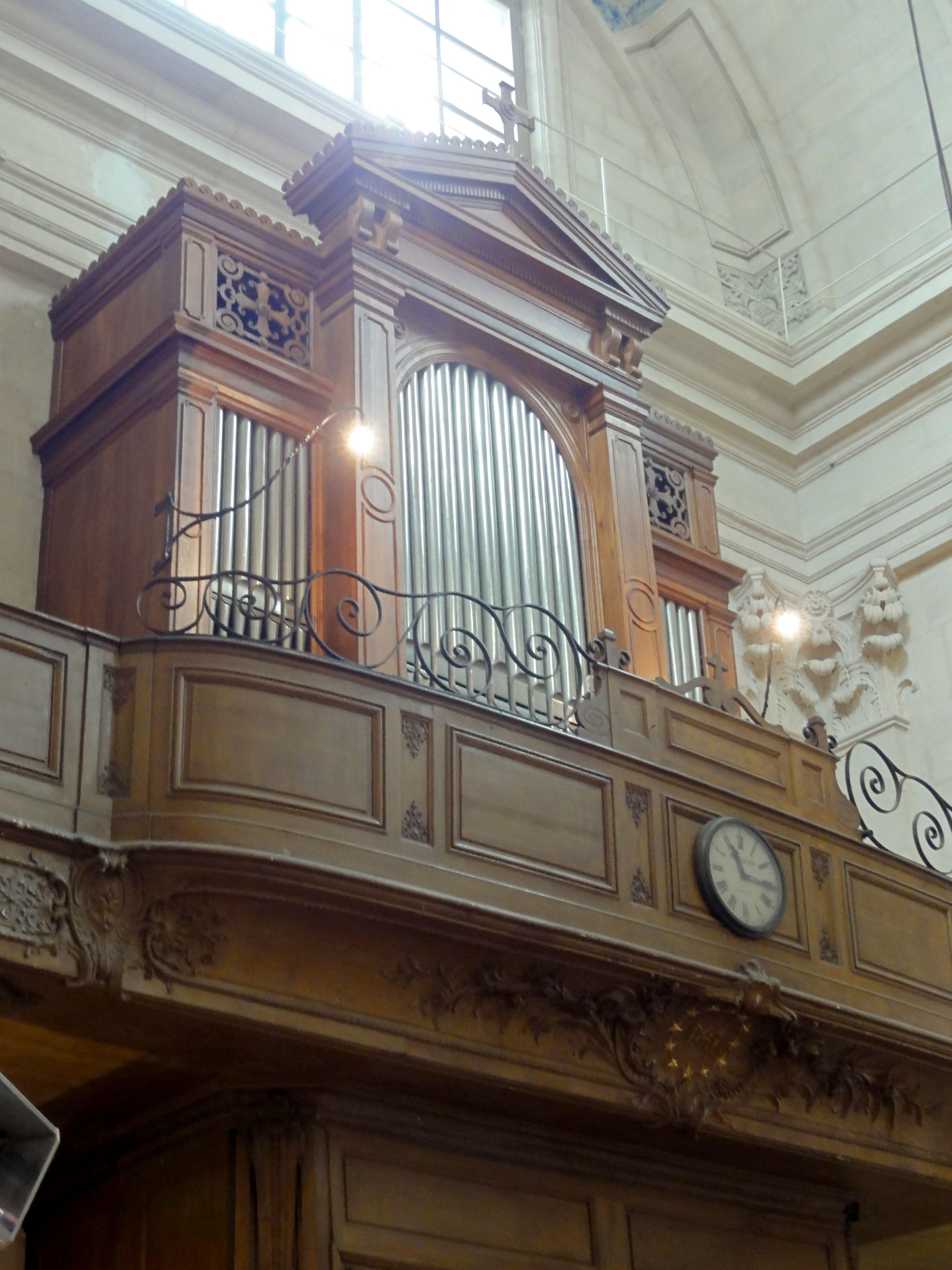 Orgue de tribune classé M.H.